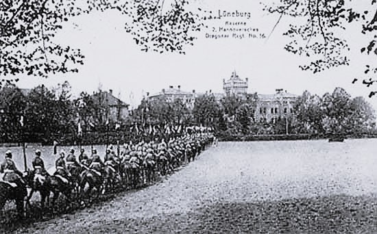 Dragoner-Regiment Nr. 13 vor der Kavallerie-Kaserne in Lüneburg um 1908